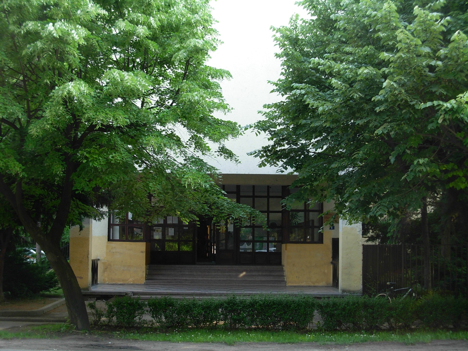 Osnovna škola "Jovan Dučić" u Petrovaradinu.